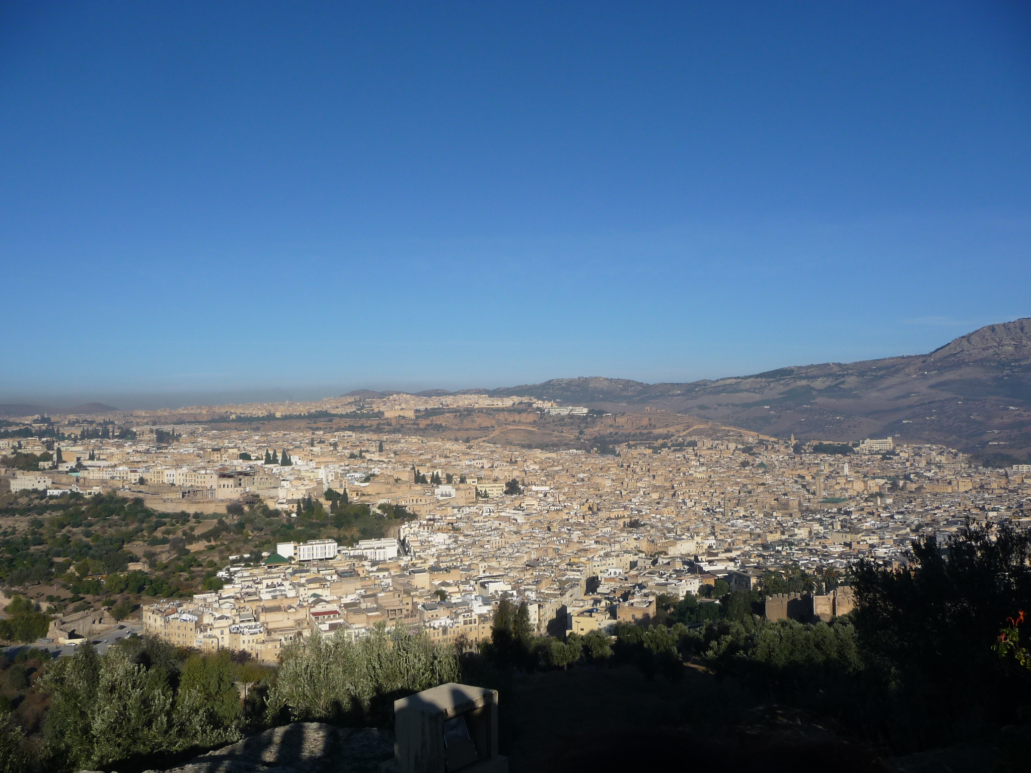 Fez-P1050443.JPG